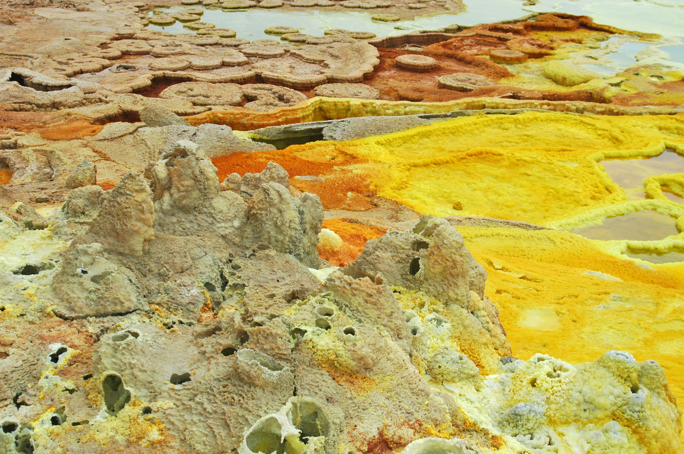 Dallol-spektakuläre Farben